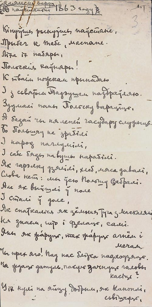 “Кінуўшы рынуўшы паўстанне…”. Крестьянское стихотворение о восстании 1863-1864 гг., записанное в 1903 г. И. Луцкевичем в селе Ухвищи Лепельского уезда от лесника К. Косцюка. 1910-е -1920-е гг. Автограф И. Луцкевича. На белорусском языке